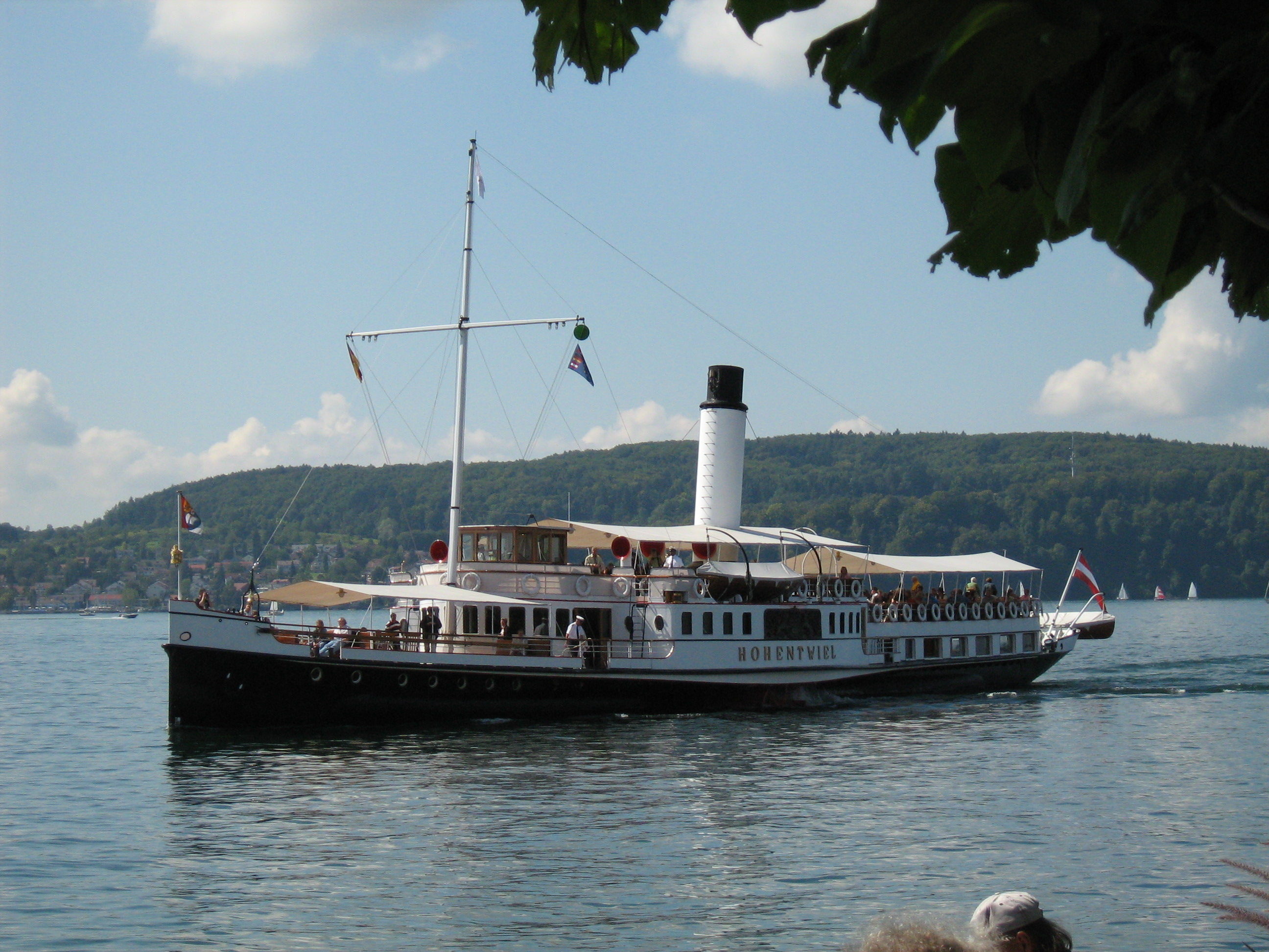 Bodensee-Raddampfer Hohentwiel